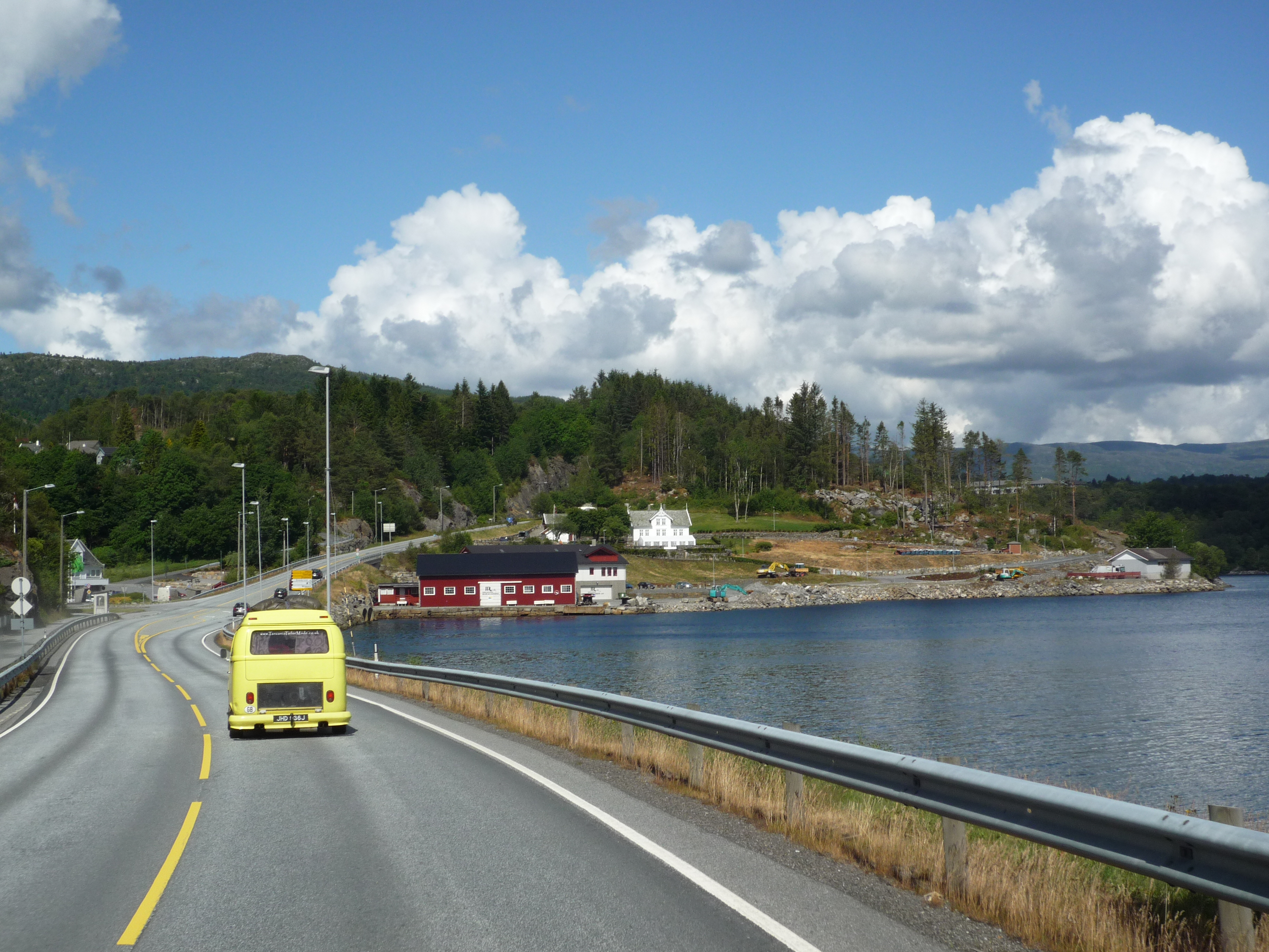 Europaveg 134 i Skjold i Vindafjord kommune. Fjorden er Skjoldafjorden